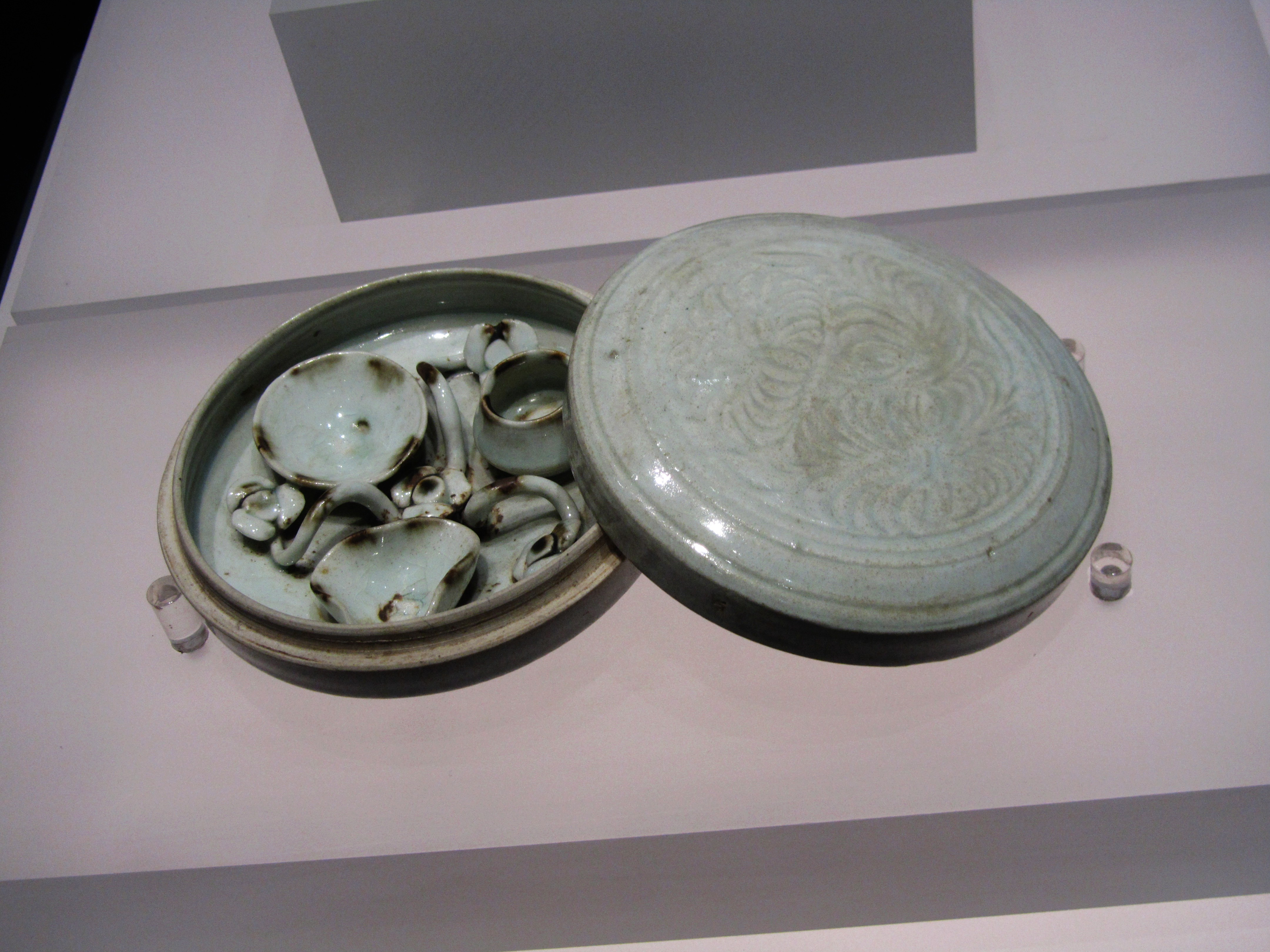 北宋景德镇窑影青釉菊花纹粉盒，1979年合肥矿业学院出土。